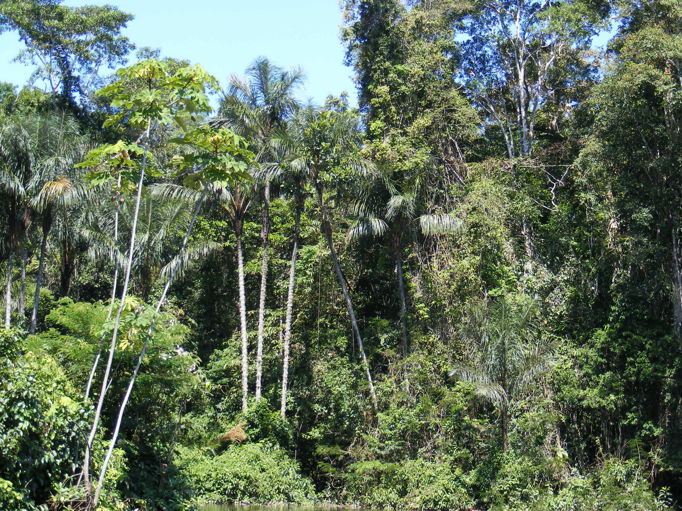 Amazonian rainforest, upper Amazon basin, Loreto Region, Peru.